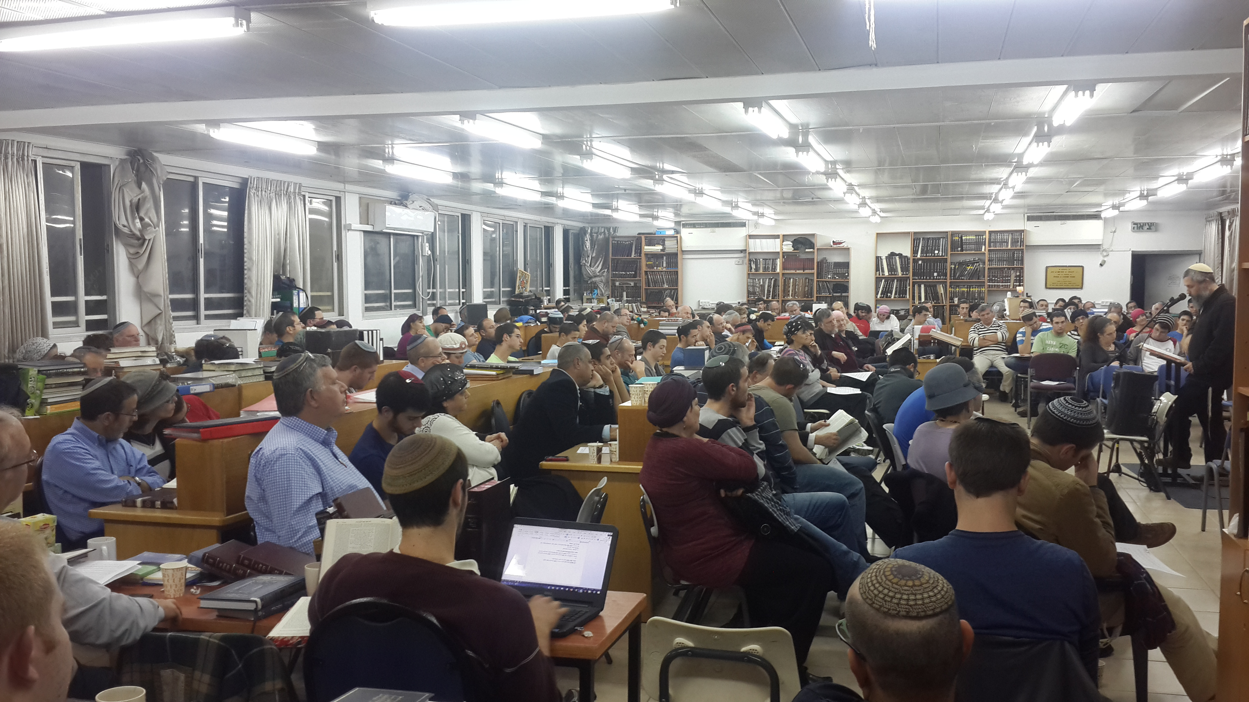 ערב לימוד בישיבה